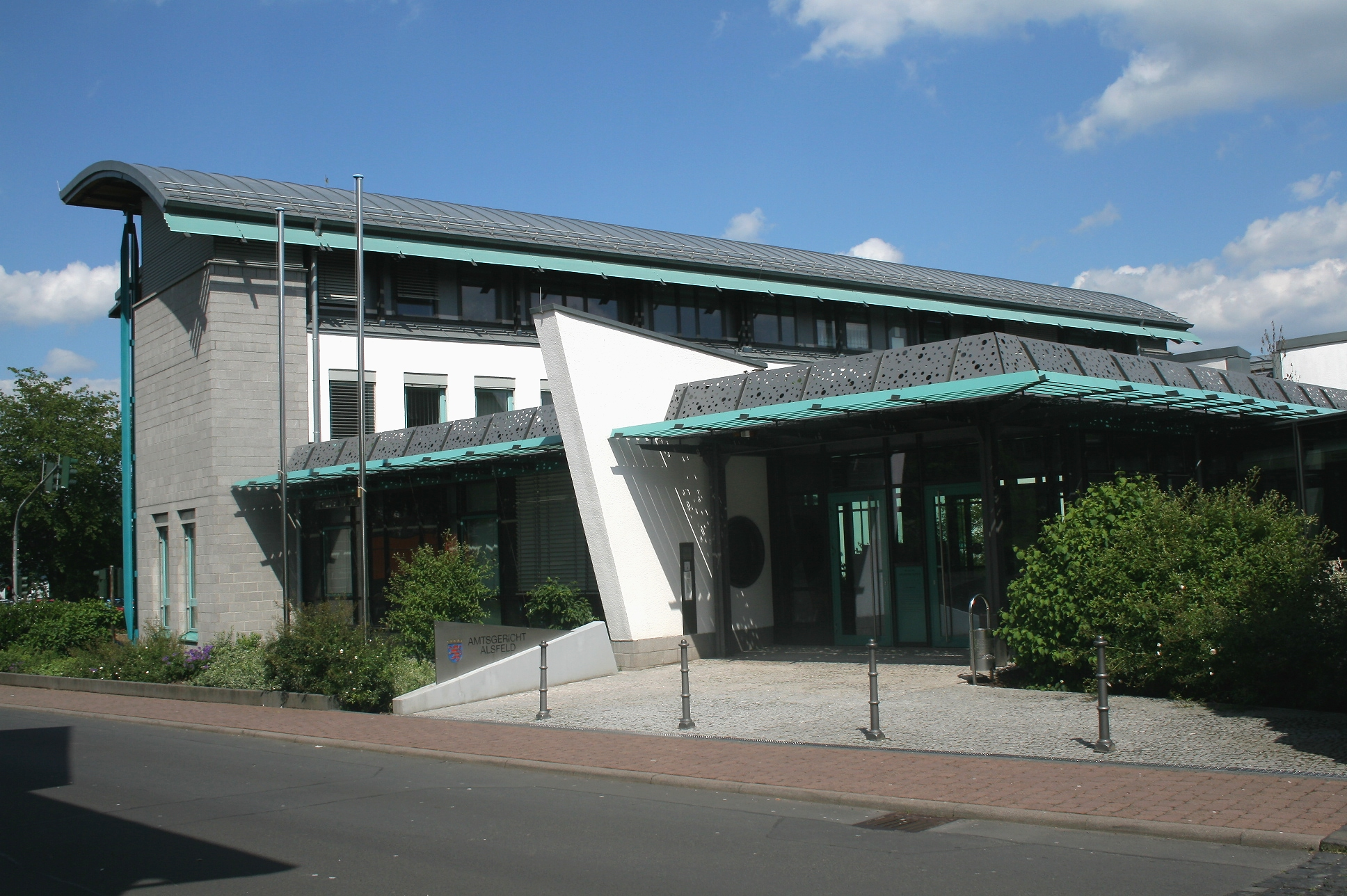 Gebäude des Amtsgerichts Alsfeld, Landgraf-Hermann-Straße 1 in Alsfeld.